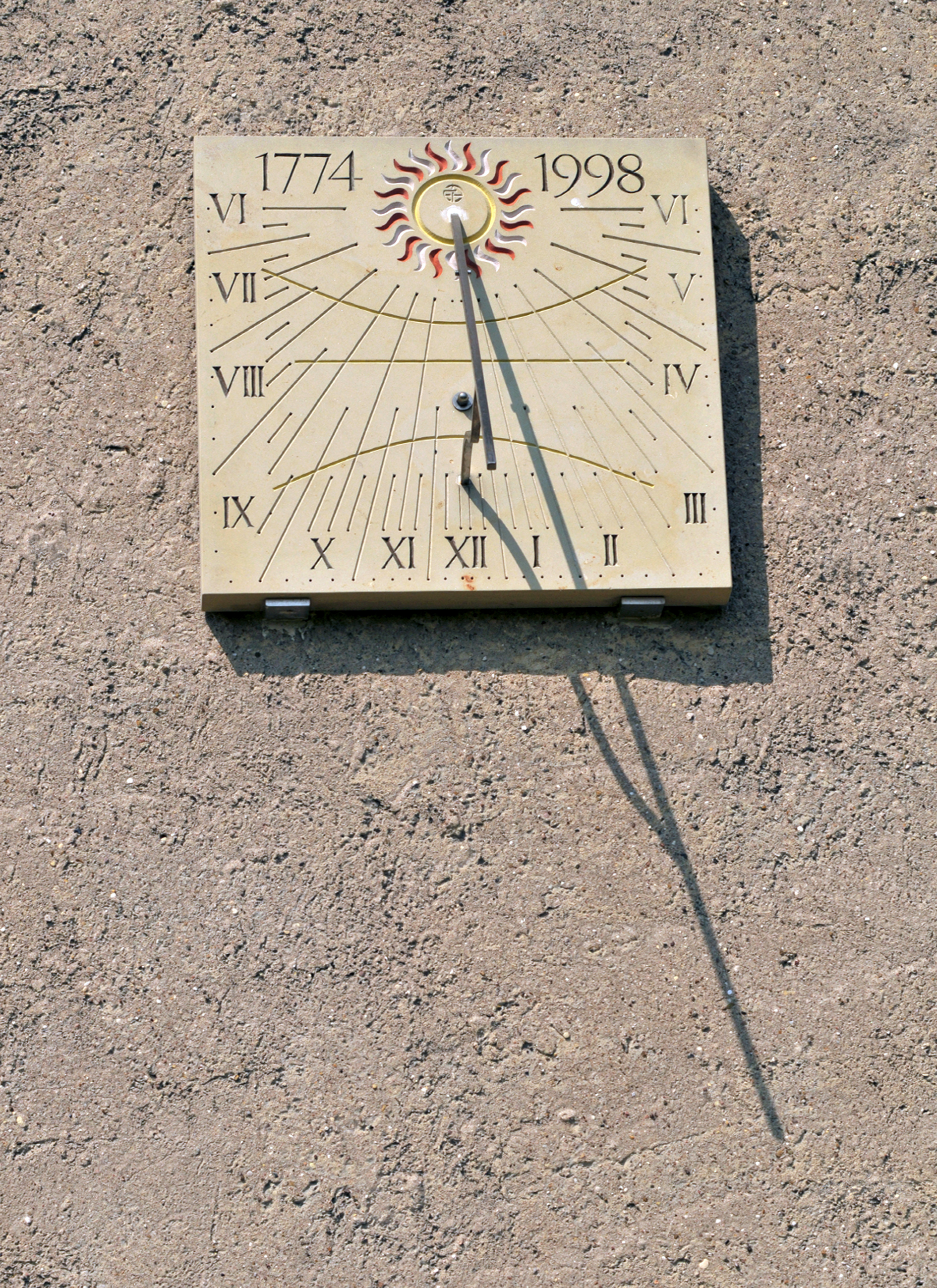 Die abgebildete Vertikal-Sonnenuhr mit Polstab von Erich Pollähne wurde am 28. Mai 1998 an der südlichen Außenseite der Marienkirche von Wülfingen montiert. Die Fotographie wurde am öffentlichen Weg zur Kirche aufgenommen und fällt unter die Panoramafreiheit.